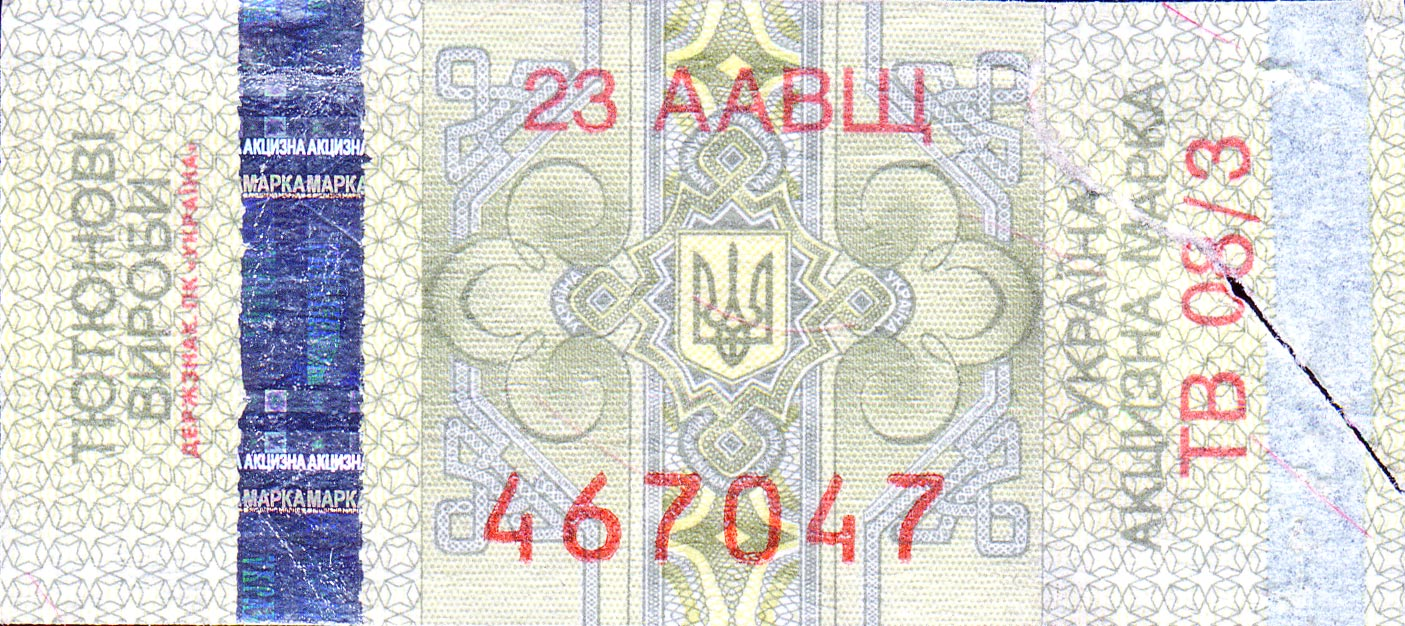 Акцизная марка на табачные изделия